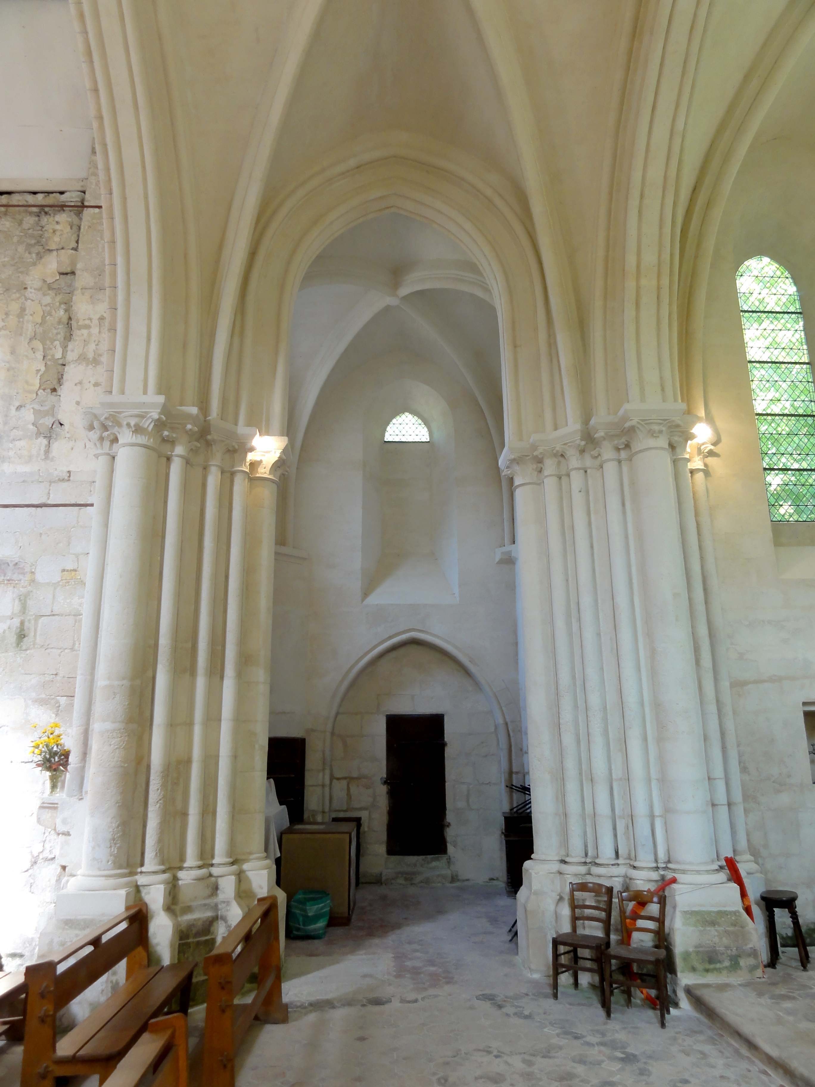 Intérieur de l'église - voir titre.